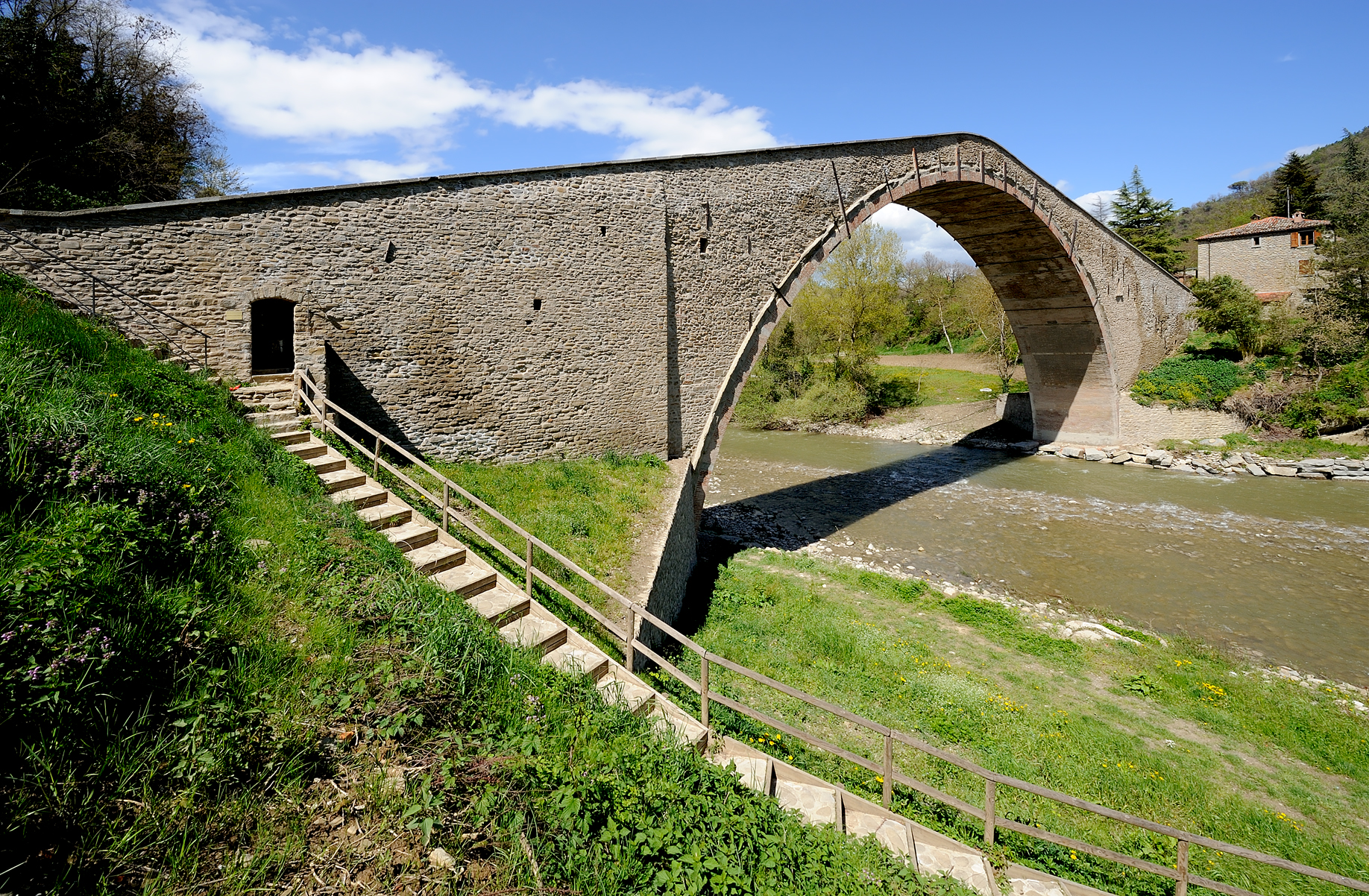 Ponte Alidosi - MIBAC This is a photo of a monument which is part of cultural heritage of Italy.